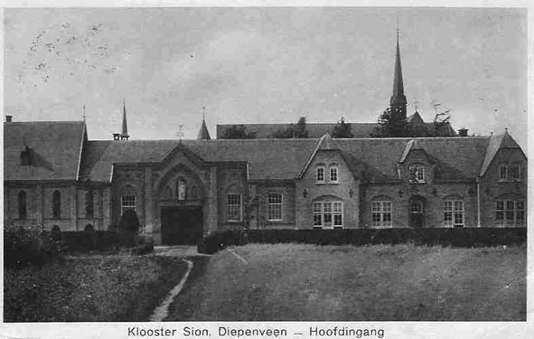 Klooster Sion Raalterweg in Averlo bij Diepenveen